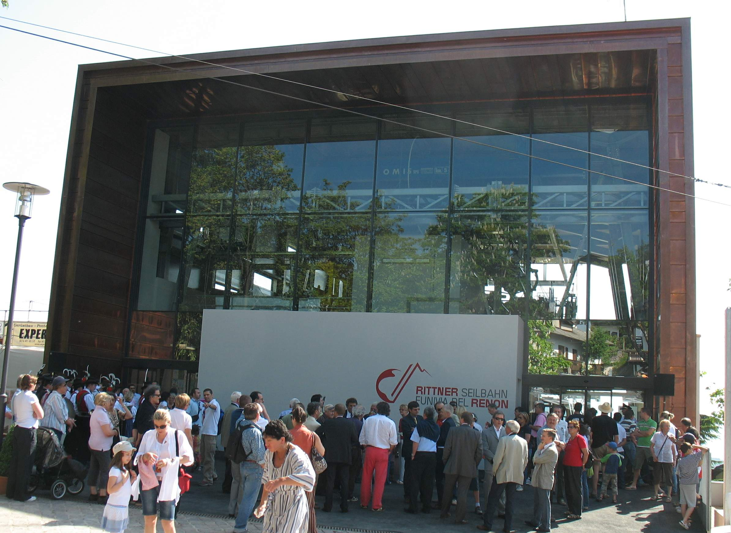 La stazione a monte - Renon soprabolzano 23/5/09